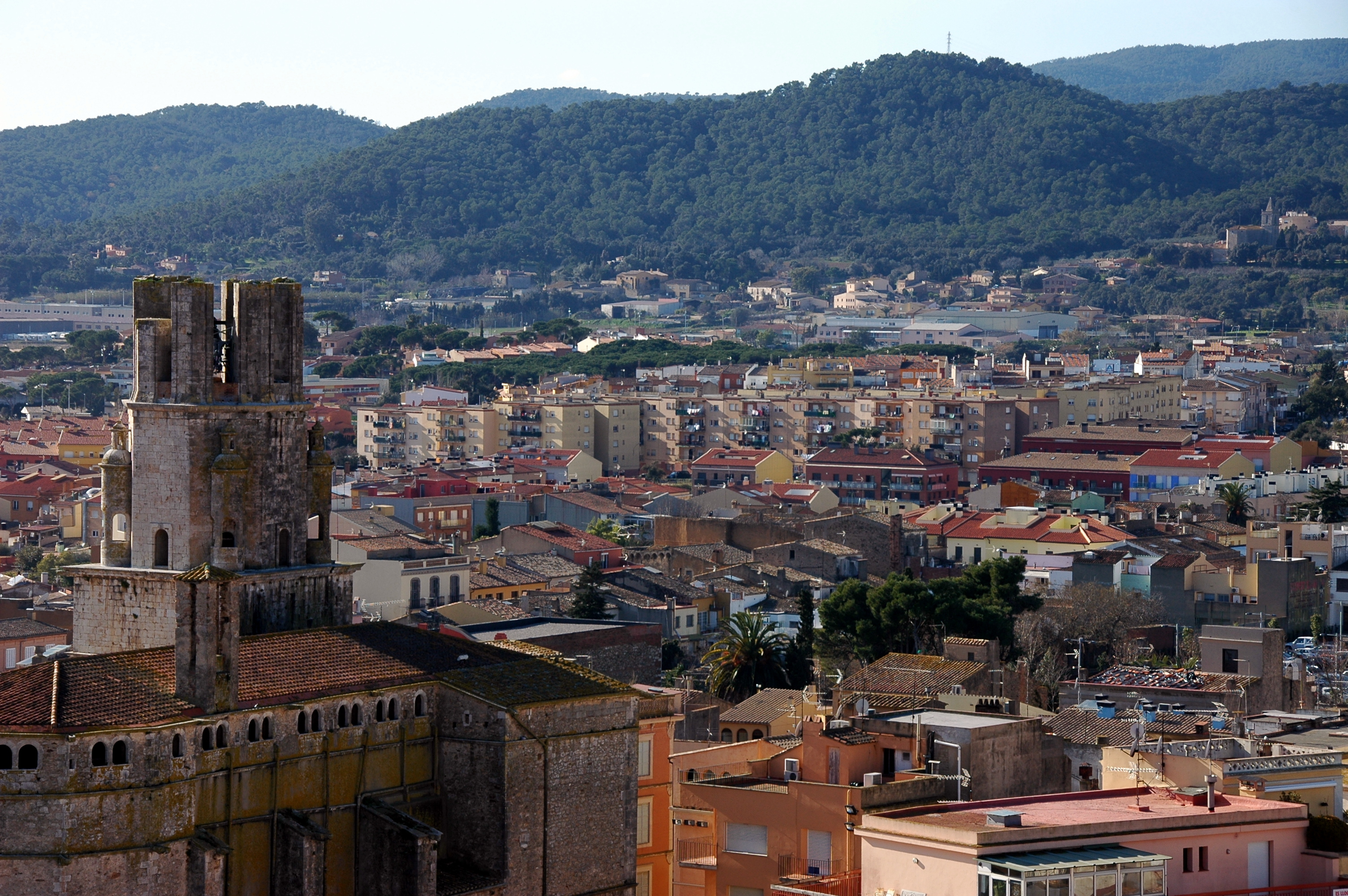 Els característics pisos del barri de la Sauleda de Palafrugell.